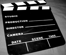 Foto personale di Shaka